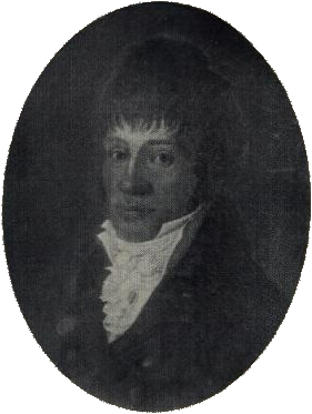 Norwegian: Musikklærer Lars Roverud.label QS:Lno,"Musikklærer Lars Roverud."